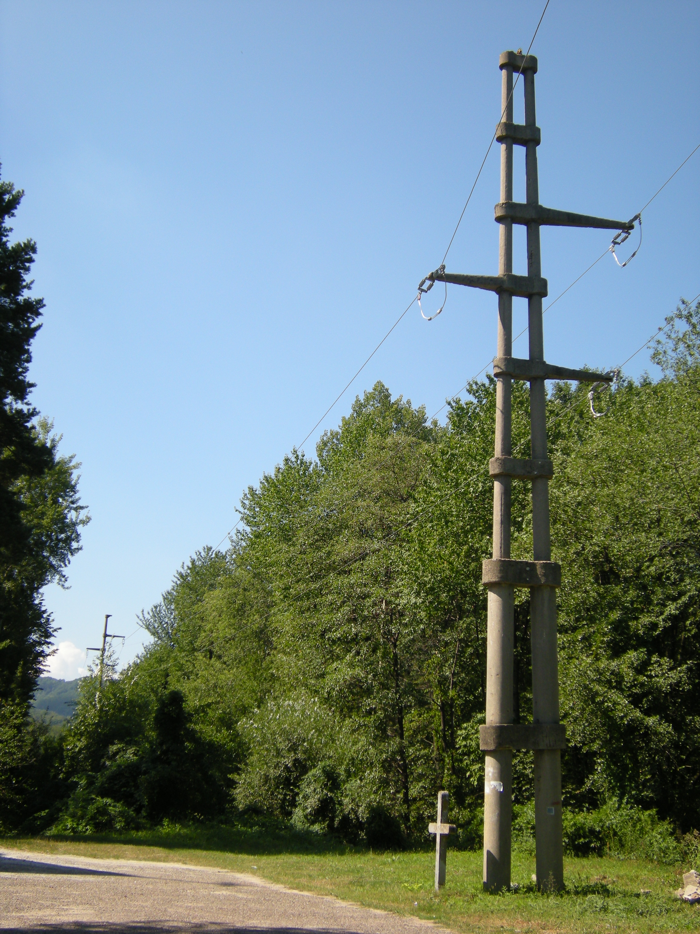 Prima linie electrică de înaltă tensiune 35 kV pe stâlpi de beton armat din România și prima linie de 35 kV din regiunea Moldova.